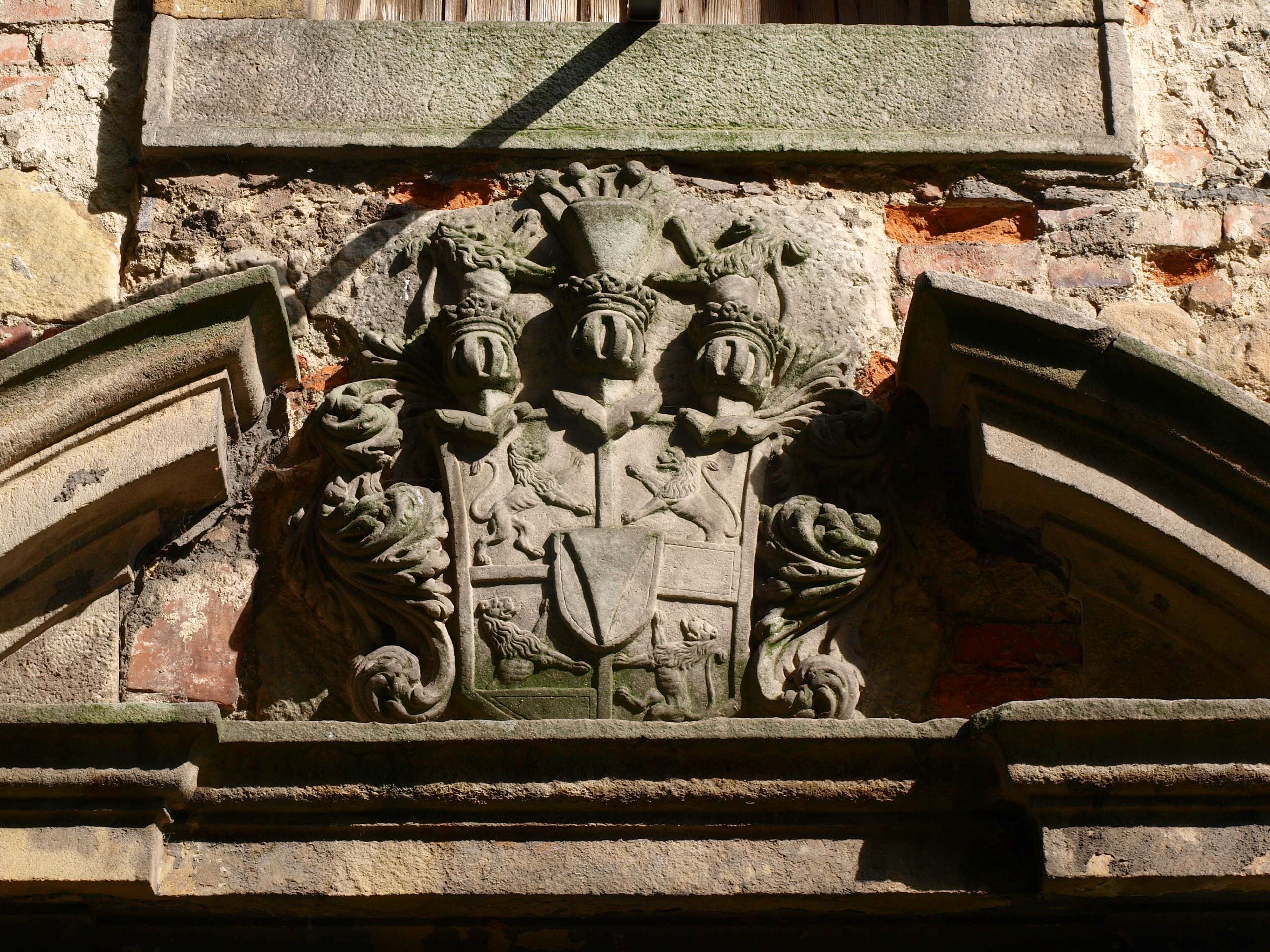 Brniště kostel